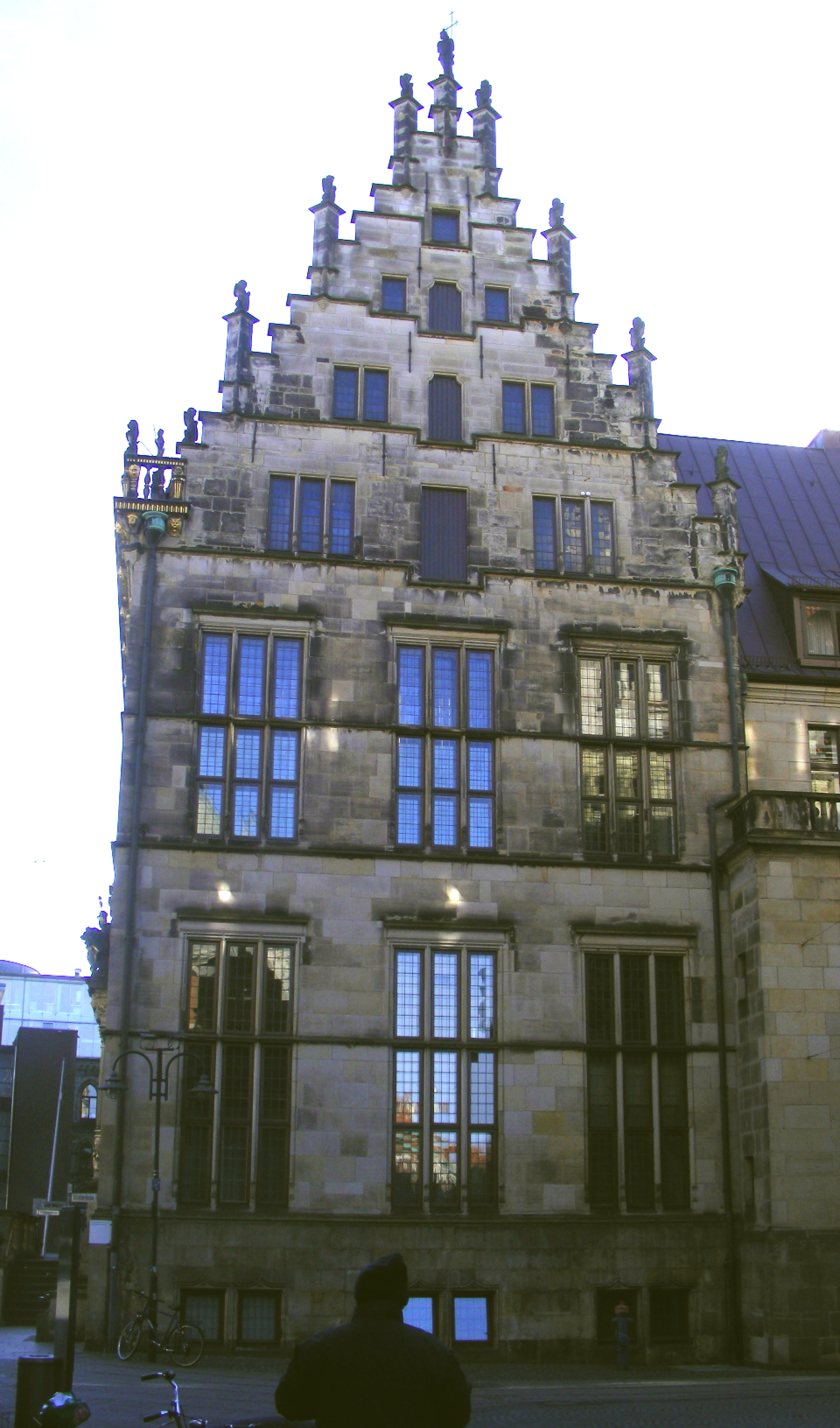 Spätgotischer Westgiebel von 1538 des Schütting in Bremen